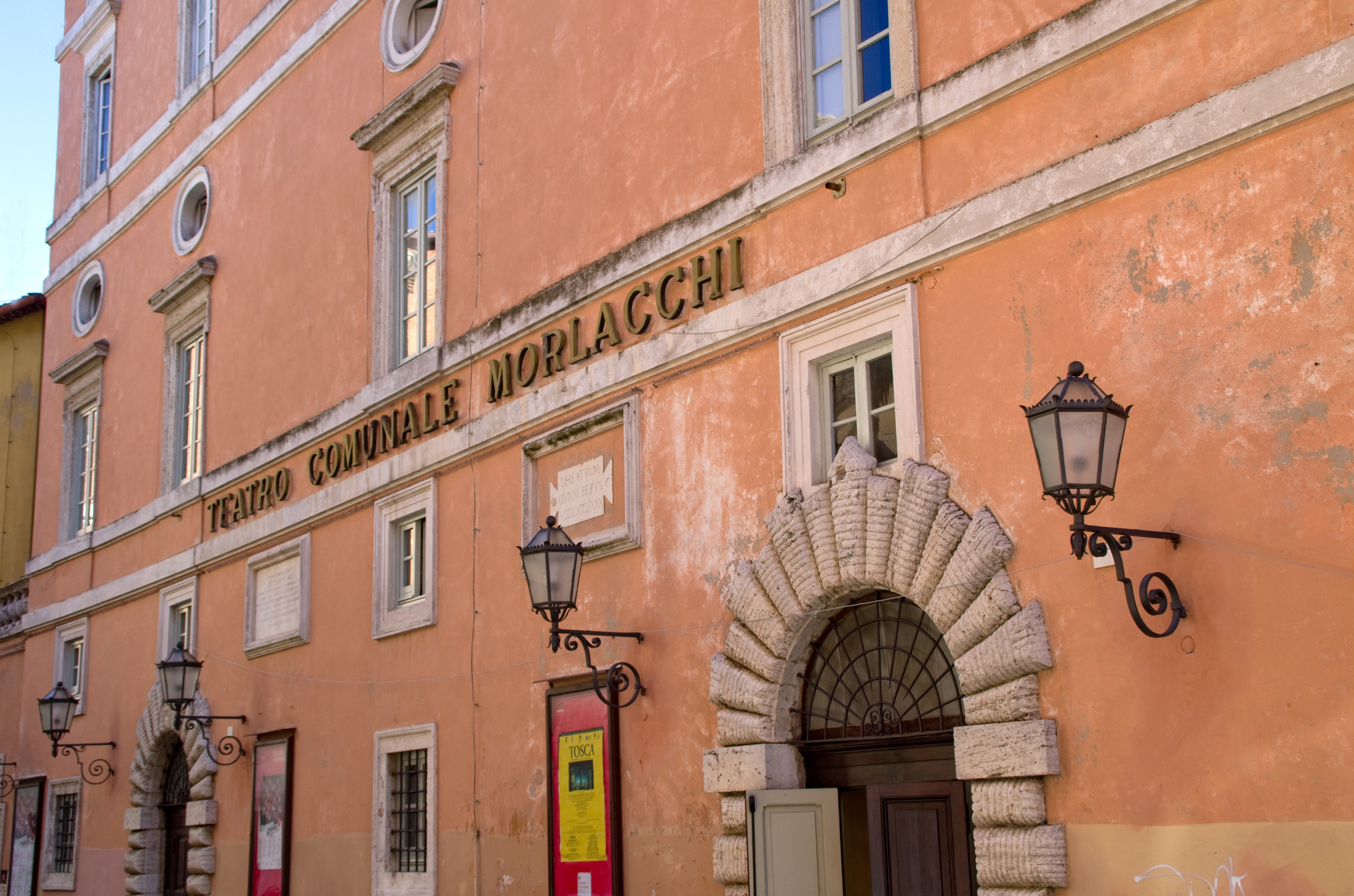 Teatro Morlacchi This is a photo of a monument which is part of cultural heritage of Italy.